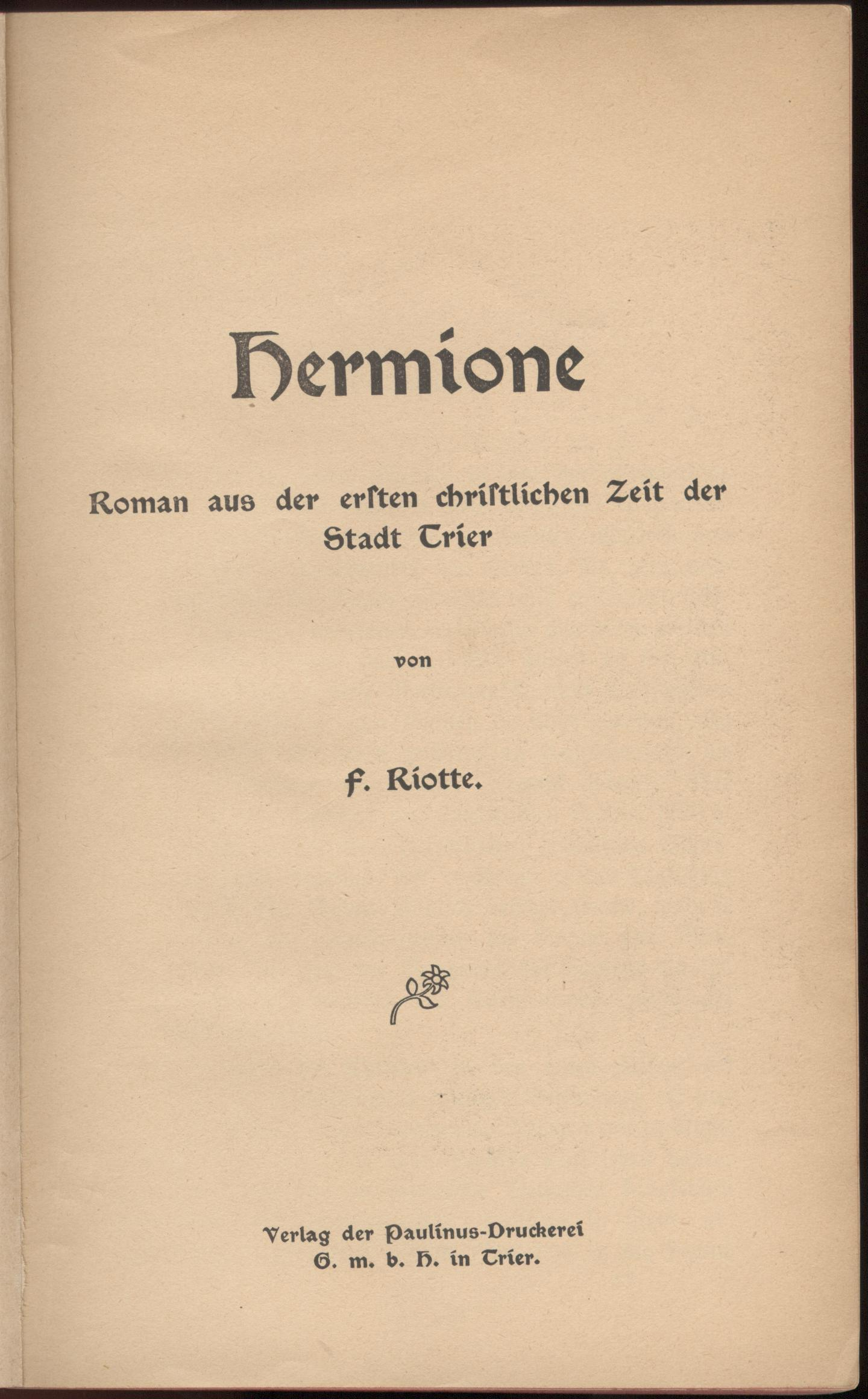 Titelblatt Franziska Riotte Roman